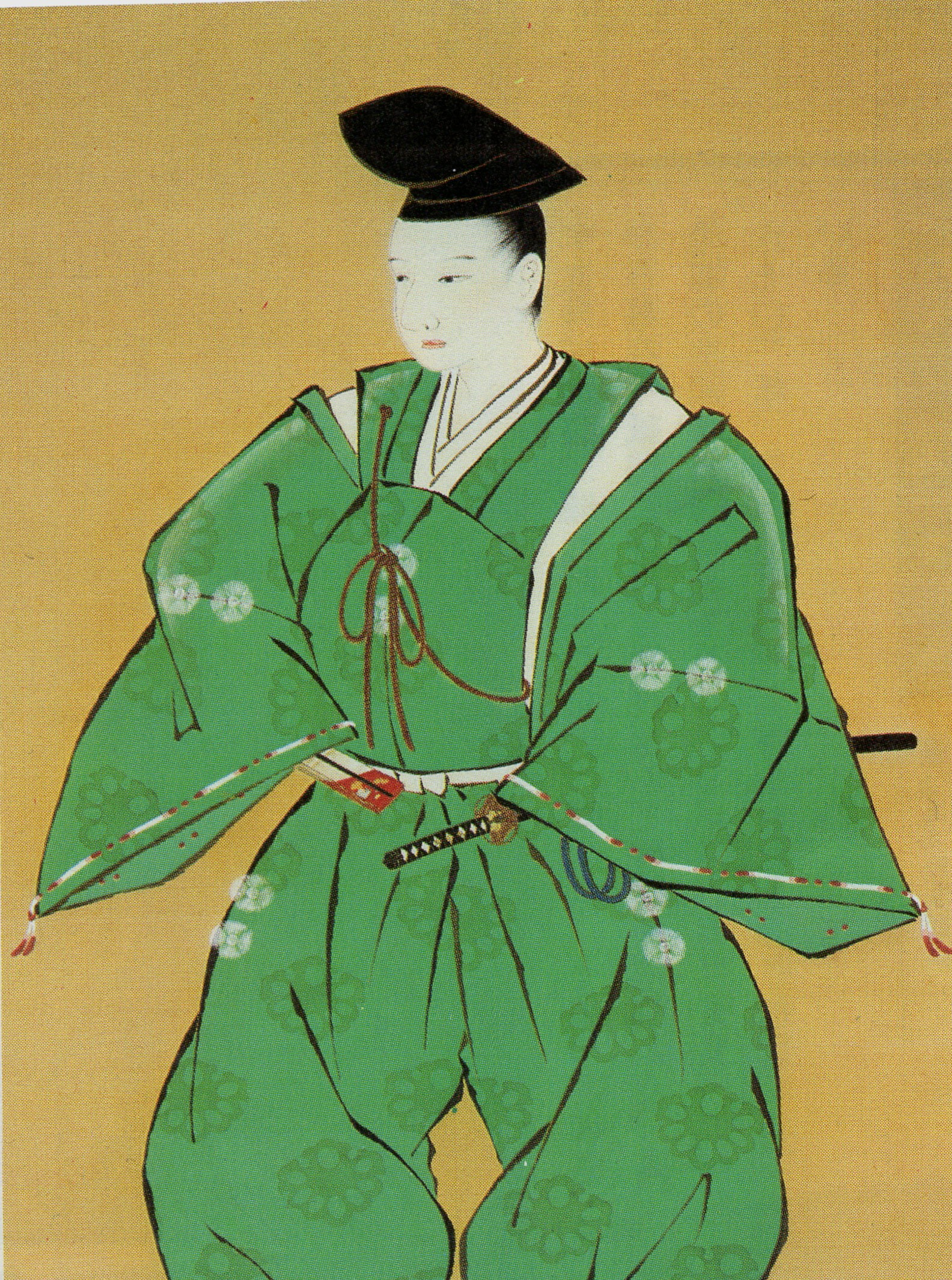 松平定直の肖像。